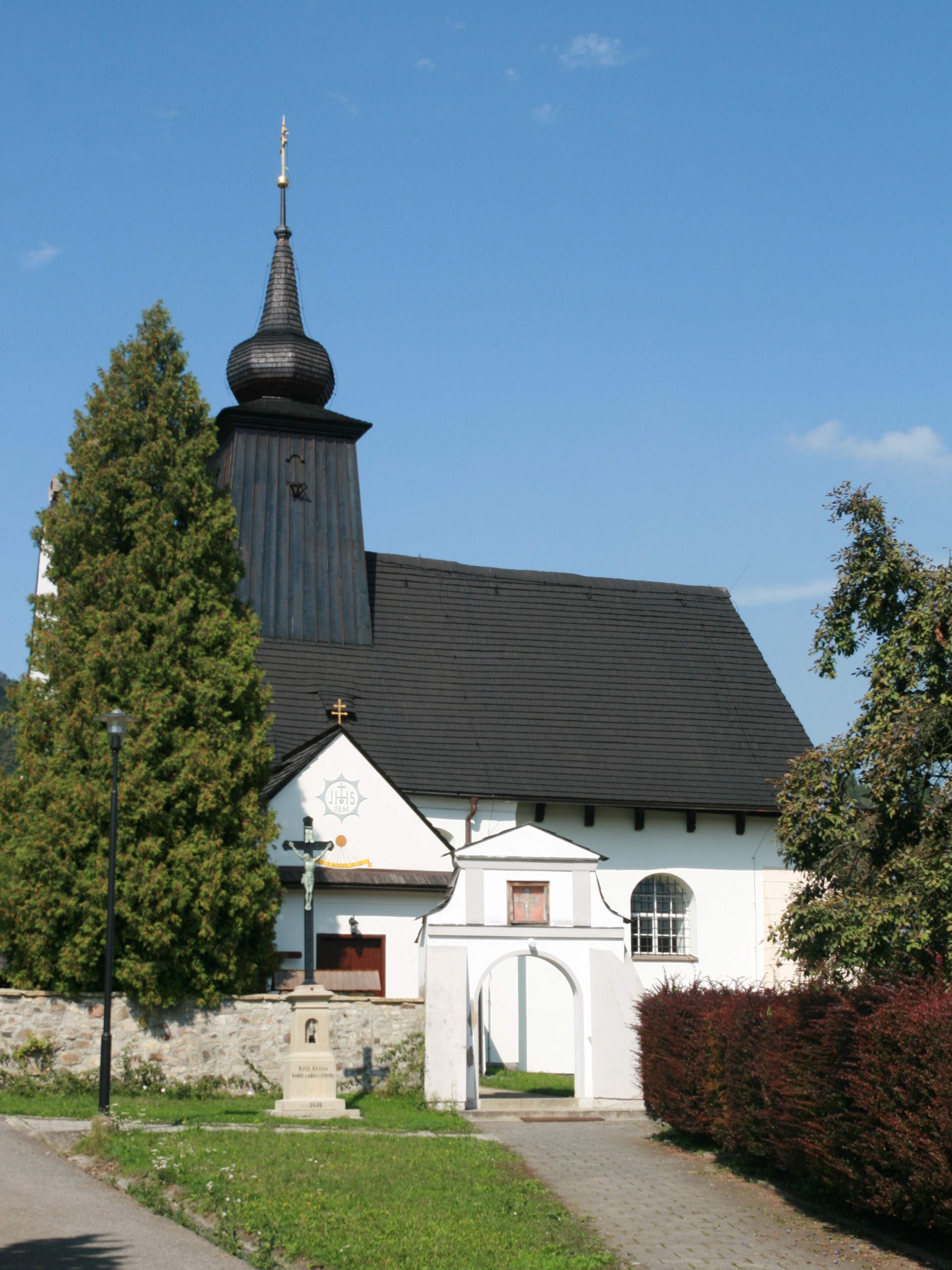 Obec Rybí v okrese Nový Jičín. Kostel Nalezení svatého Kříže. Čelní pohled z ulice.